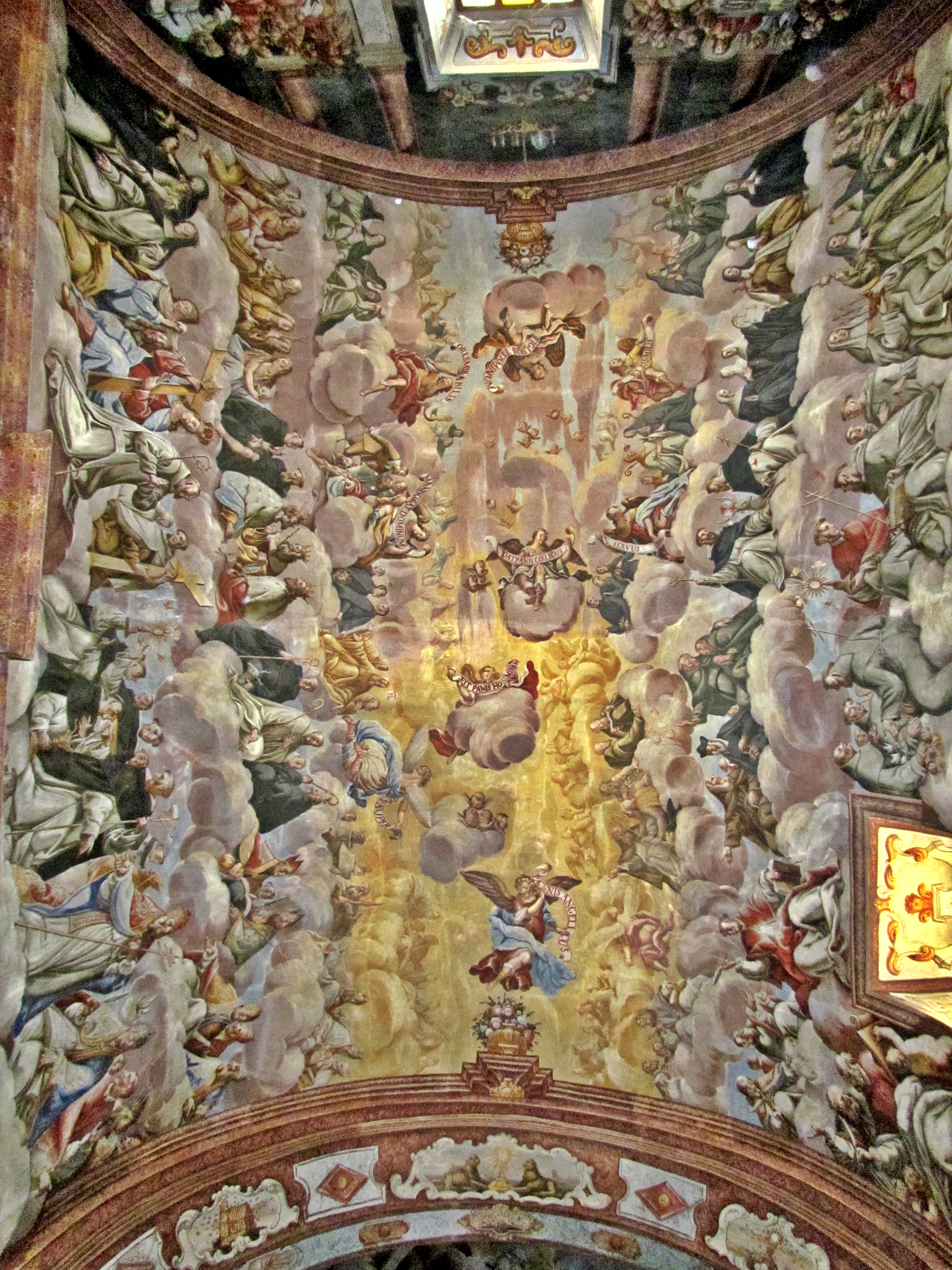 Volta de la capella de la Comunió de l'església de l'Assumpció de Catí (Alt Maestrat, País Valencià), decorada al fresc per Pasqual Mespletera